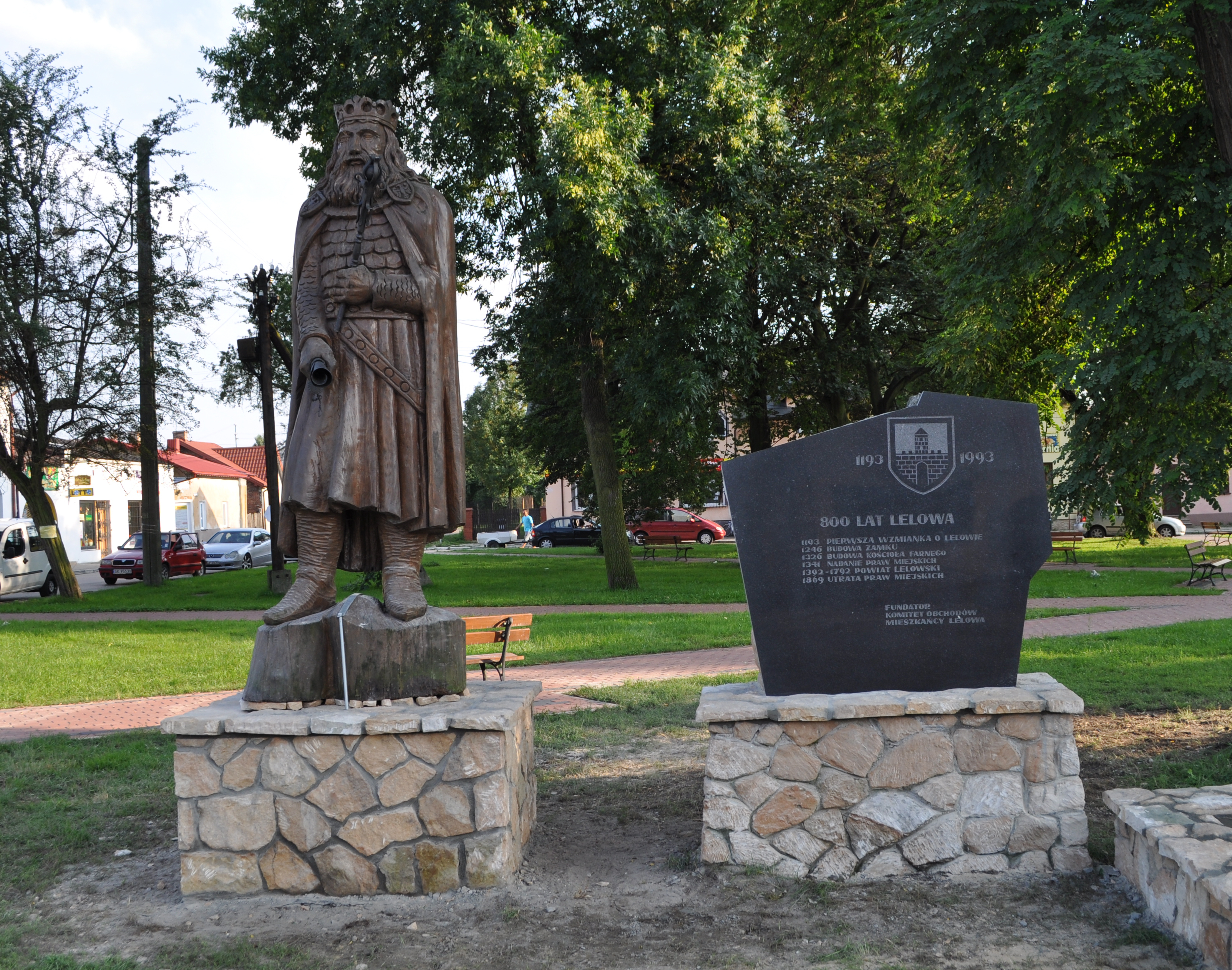 Ten obiekt znajduje się w Ewidencji Miejsc Pamięci Województwa Śląskiego dla miejscowości Lelów pod numerem 109/19.Opis